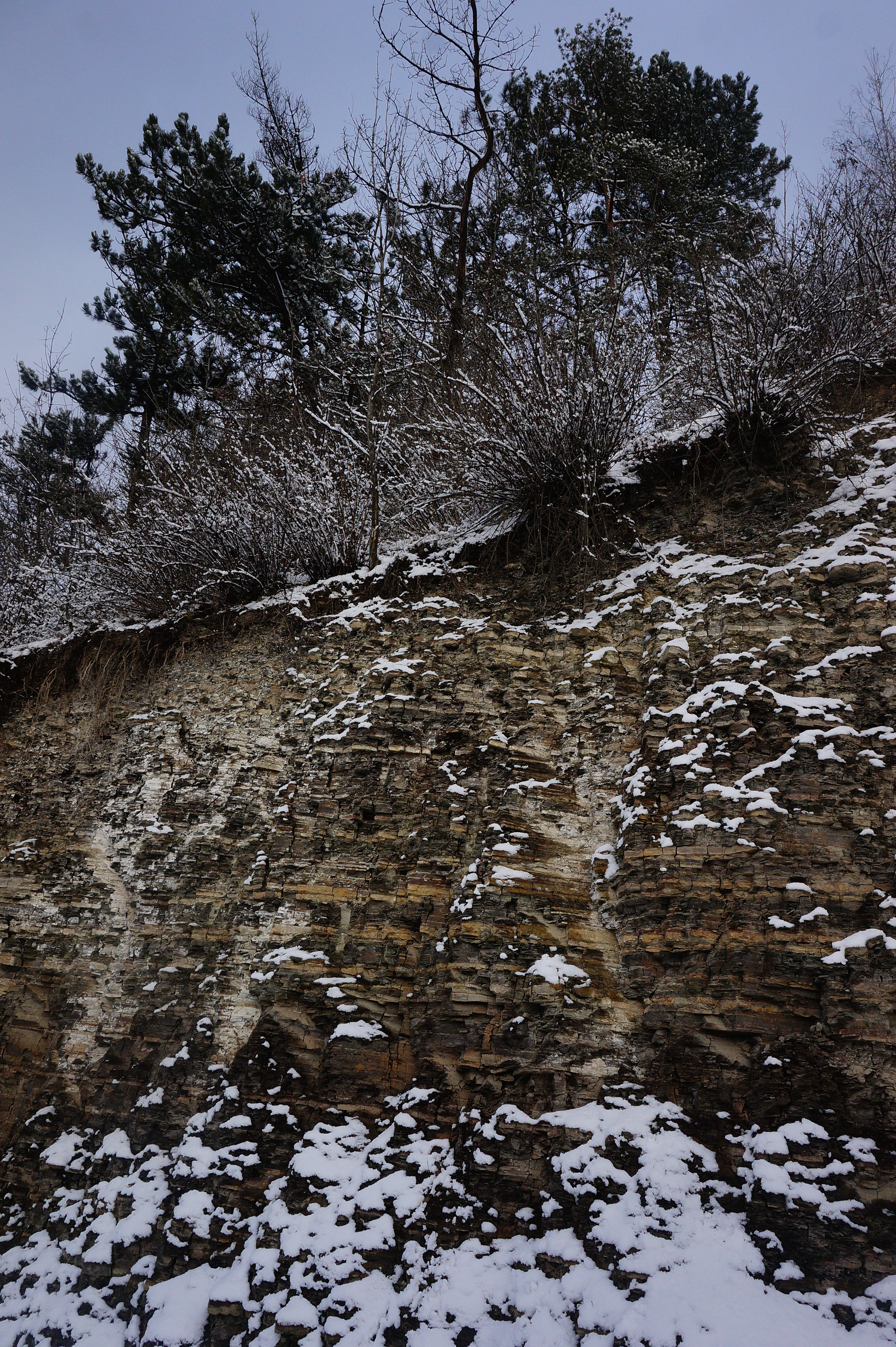 «Відслонення девону в місті Чорткові», uk::uk:Чортківський район, с. Вигнанка, лівий схил р. Серет, 1 км вище по течії від м. Чорткова